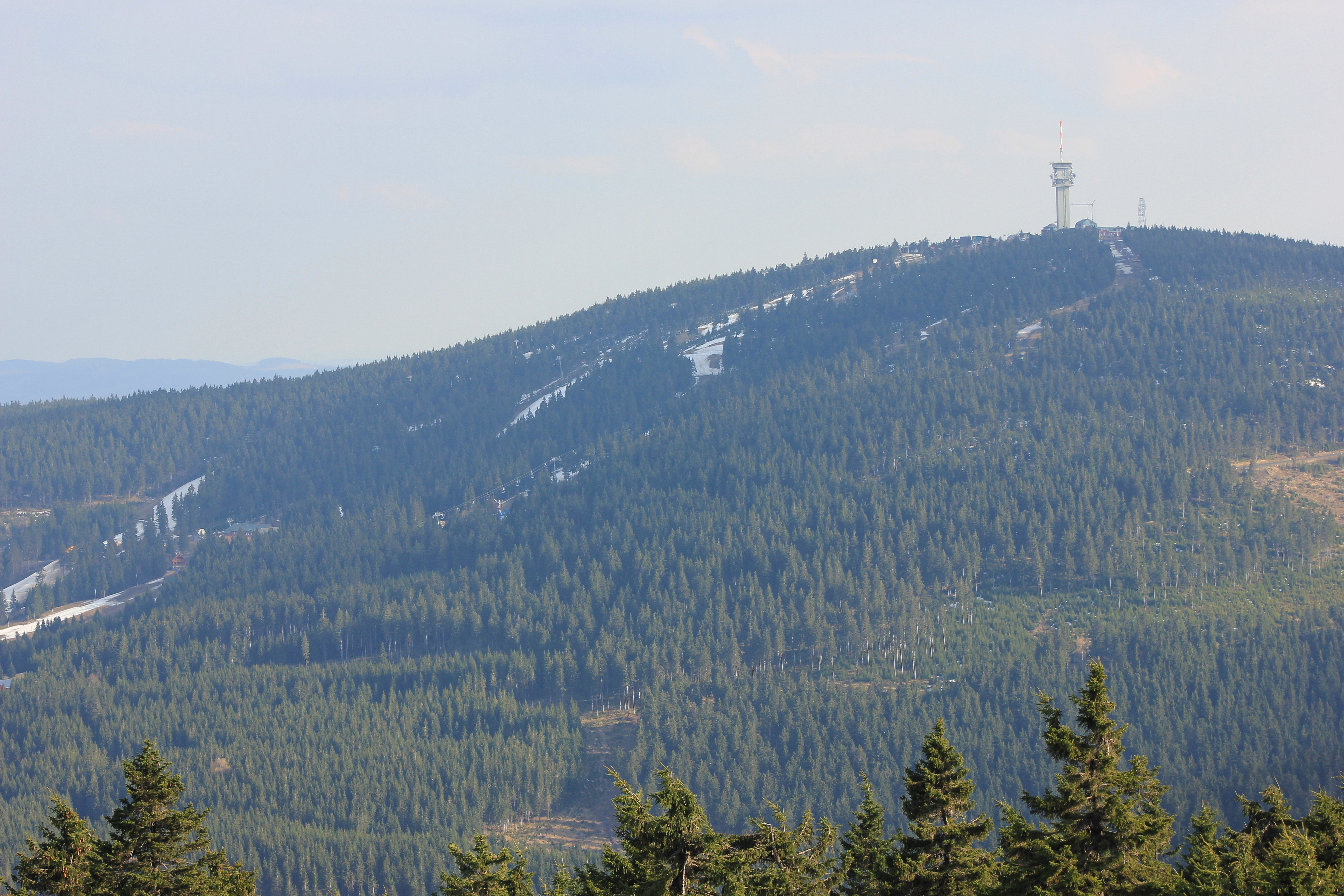 Auf dem Fichtelberg befindet sich das 1962 gegründete und 5,48 km² große Landschaftsschutzgebiet Fichtelberg (LSG-Nr. 320795), auf dem Südhang das 1961 gegründete, 18,67 ha große und zweiteilige Naturschutzgebiet Fichtelberg mit Schönjungferngrund (NSG-Nr. 163092) und direkt südwestlich davon das 1997 gegründete, 73,15 ha große und mehrteilige Naturschutzgebiet Fichtelberg-Südhang (NSG-Nr. 163093). Westlich davon liegt am Kleinen Fichtelberg das 1967 gegründete, 5,25 ha große und einteilige Naturschutzgebiet Rohr- oder Schilfwiese (NSG-Nr. 165205). Diese Gebiete überschneiden sich mit dem Fauna-Flora-Habitat-Gebiet Fichtelbergwiesen (FFH-Nr. 5543-304).[9]